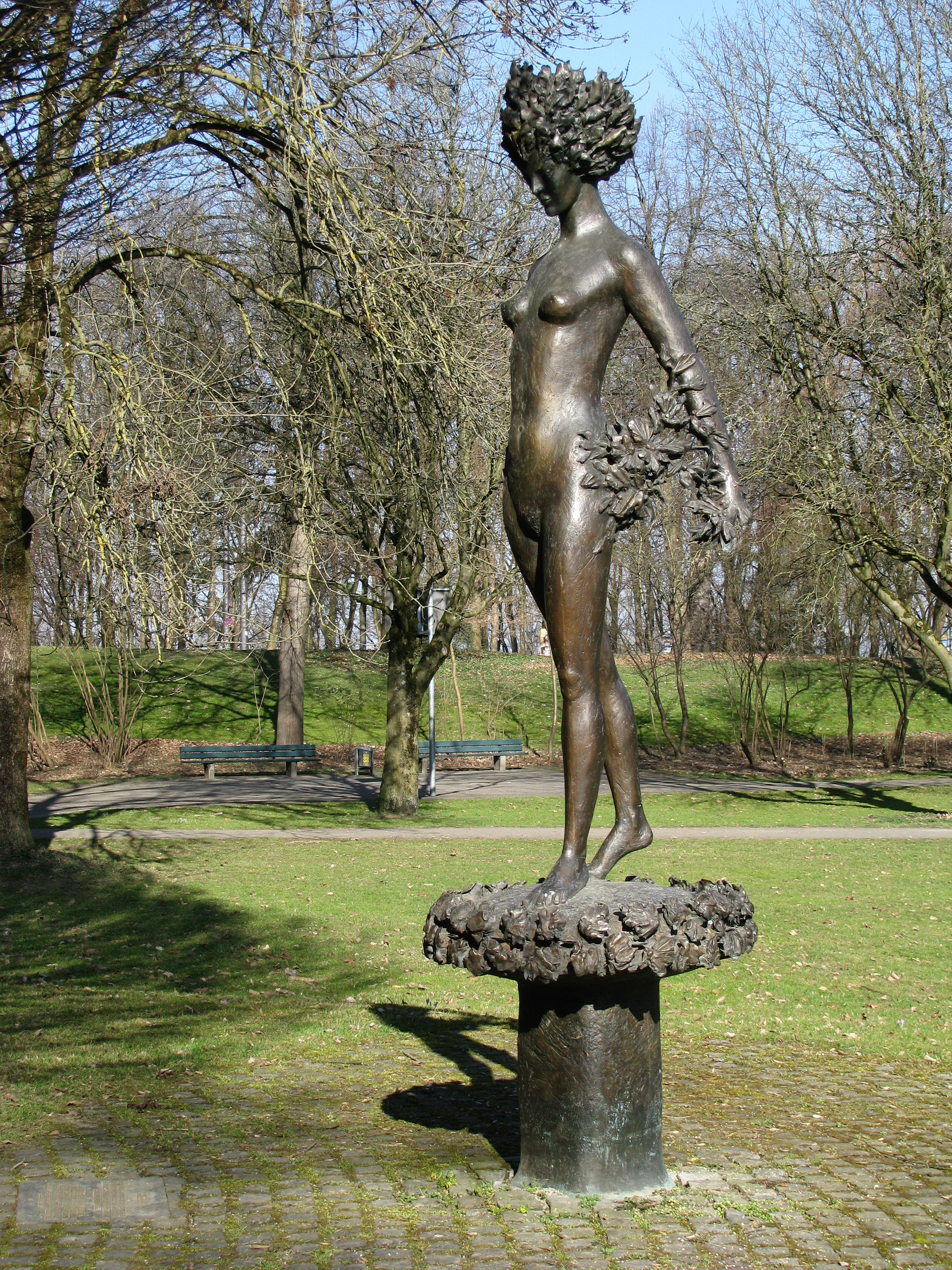 Bronzefigur der Daphne